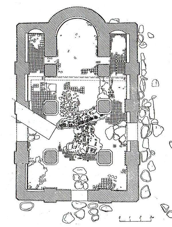 План Ніжняй царквы, Гродна